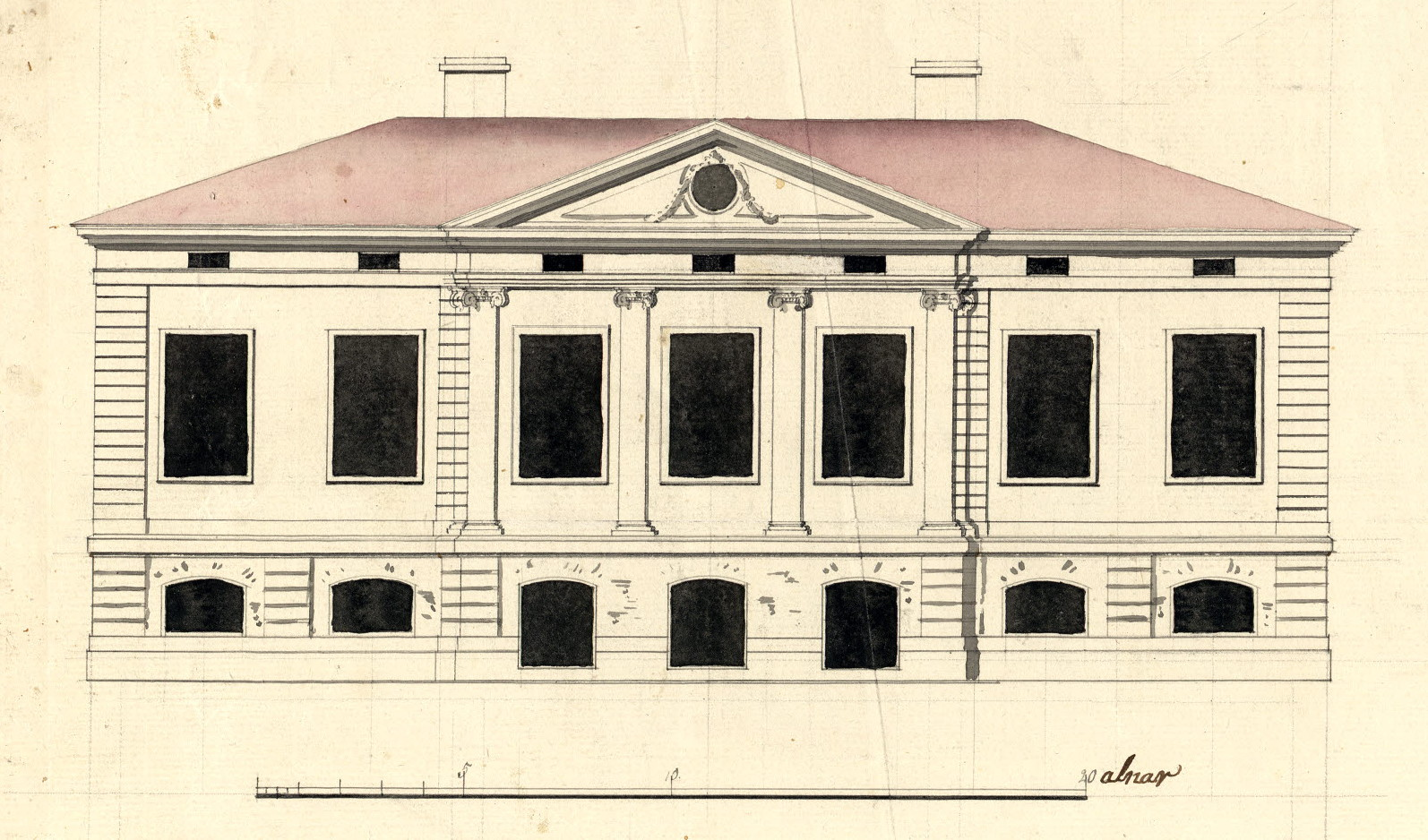 Ritning för Hartwigska huset (fasad)